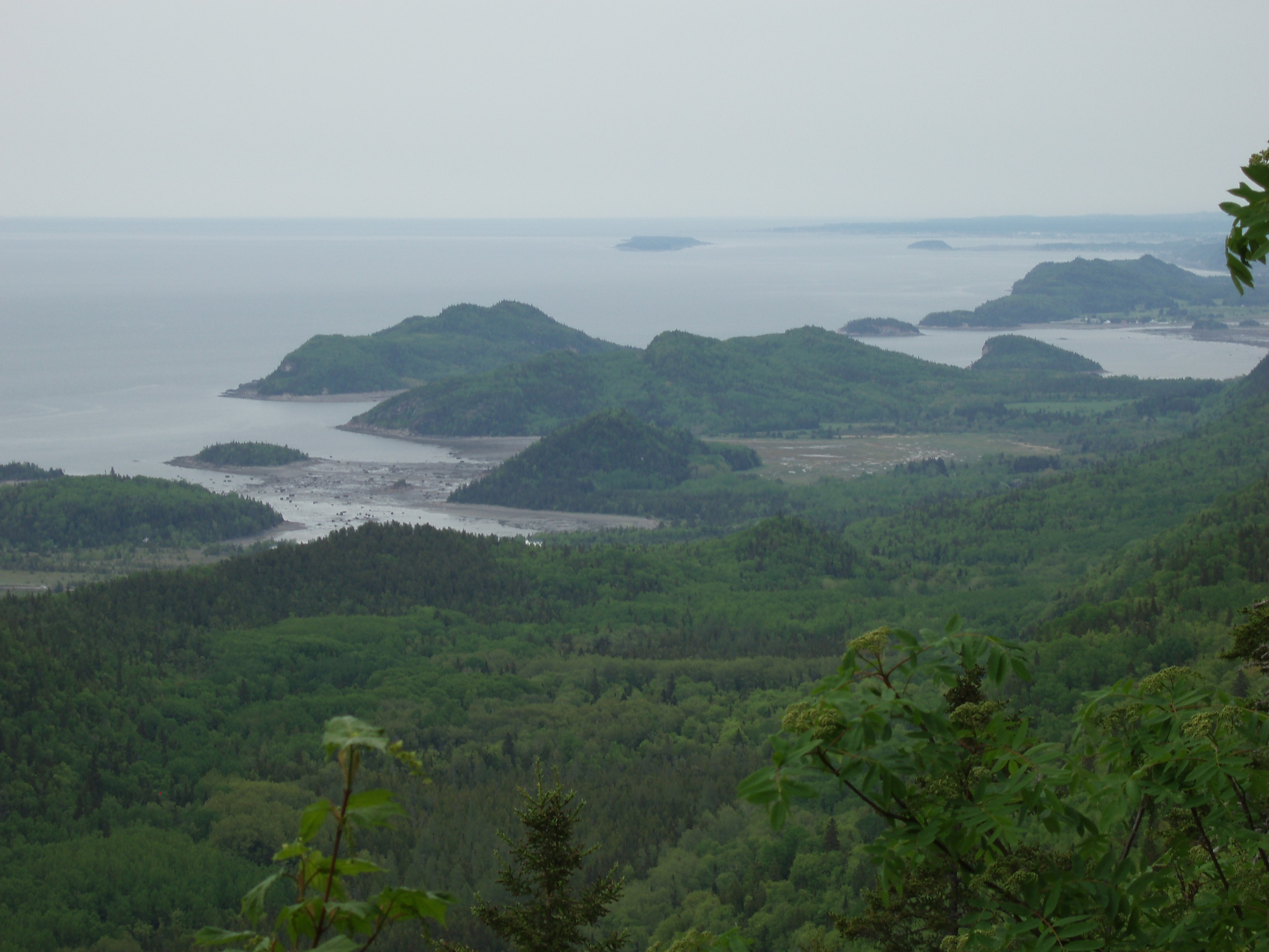 Parc National du Bic, Québec, Canada. Vue depuis le Pic Champlain vers le nord-est, avec de gauche à droite : Anse à l'Orignal, Cap Enragé, Pointe aux Epinettes, Le Chocolat, Marais de la Pointe aux Epinettes, Ile aux Amours, Havre du Bic.